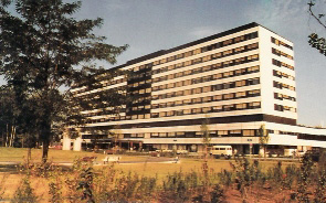 Klinikum Merheim Cologne Photographie prise le 15 mars 1994 par Utilisateur:Brunello